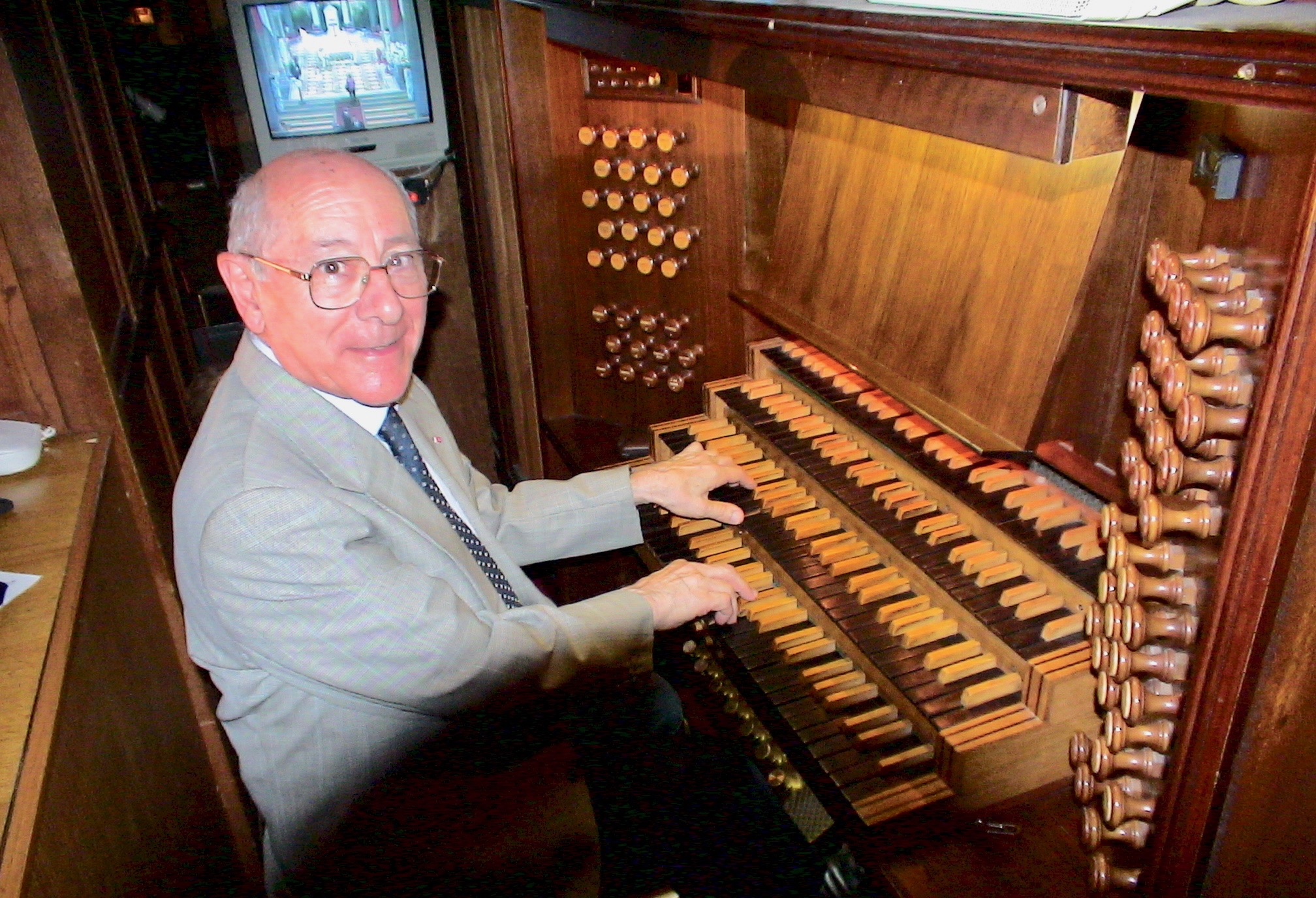 René Saorgin aux claviers du grand orgue de la Cathédrale de Monaco dont il était titulaire